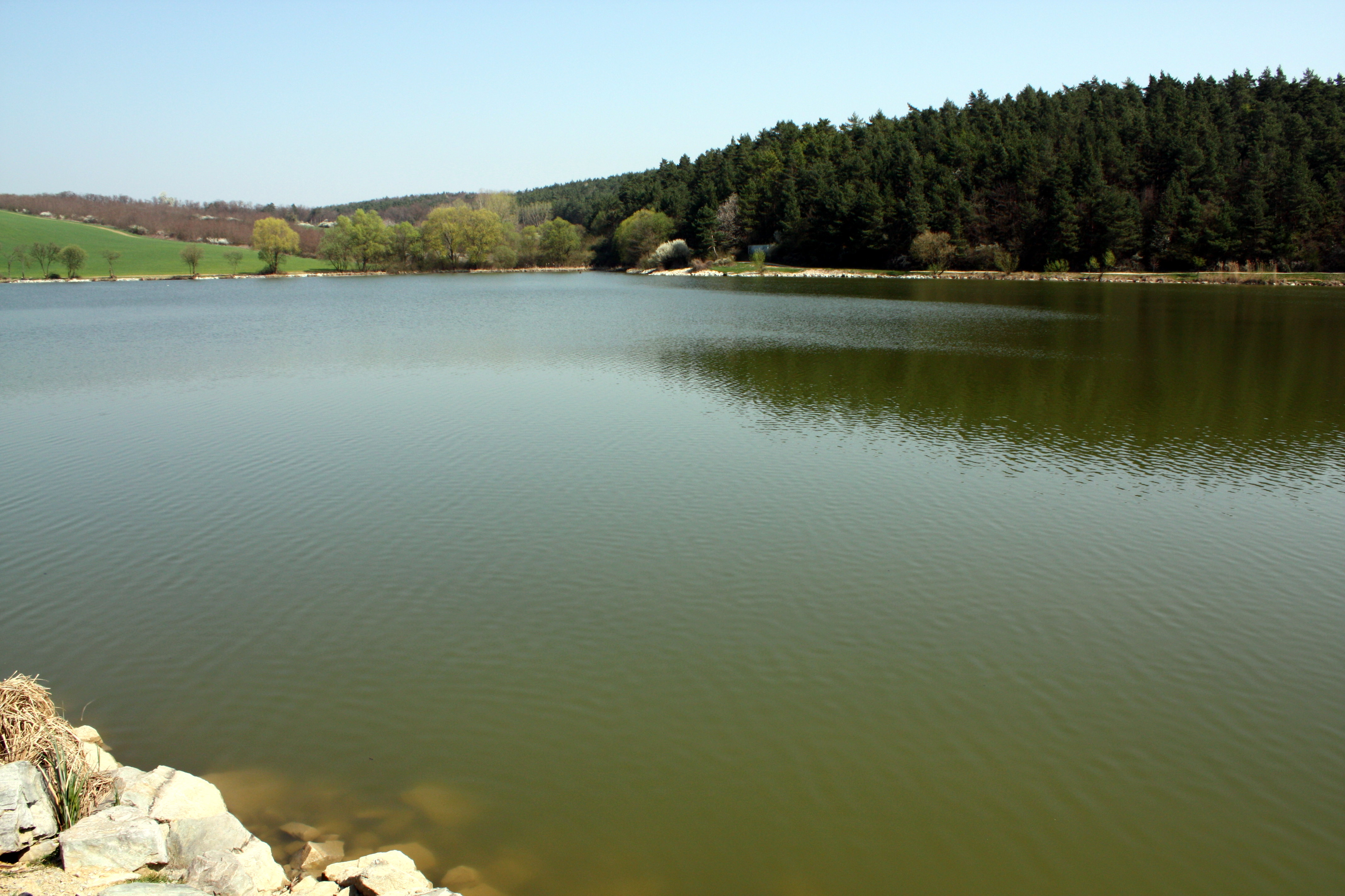 Tesáre - pri hrádzi